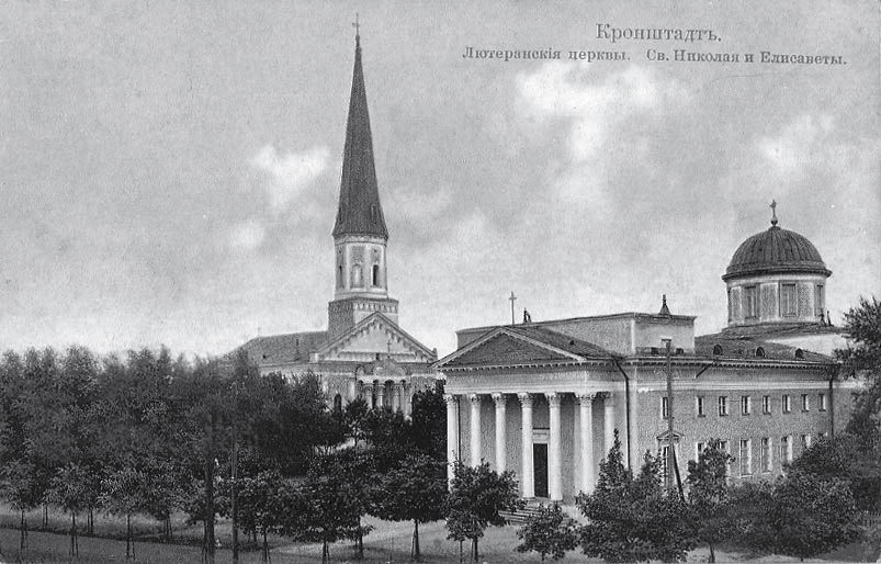 Кирха святого Николая и кирха святой Елизаветы в Кронштадте.